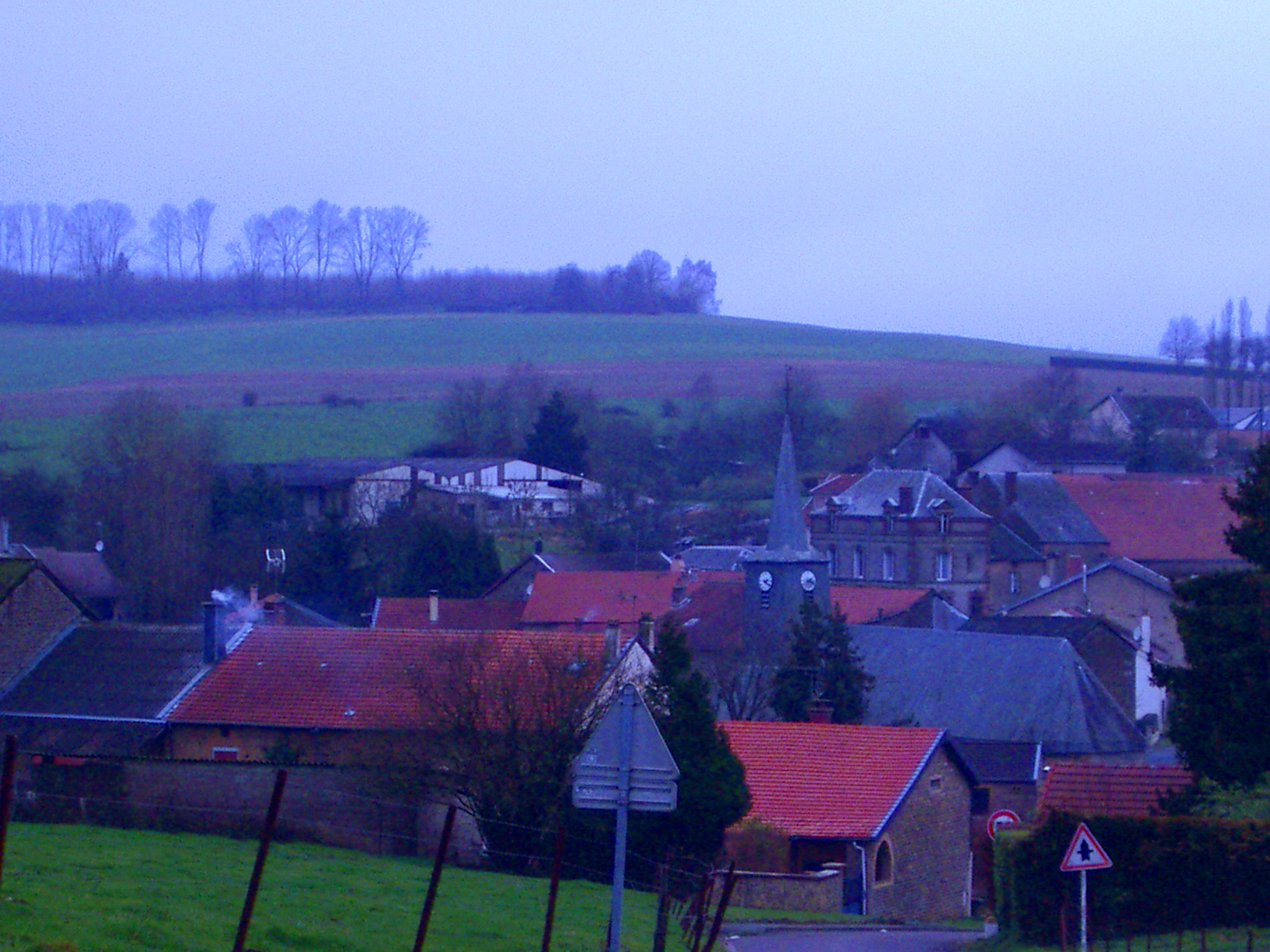 Gernelle est une commune française, située dans le département des Ardennes et la région Champagne-Ardenne